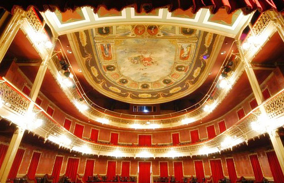 Decoración